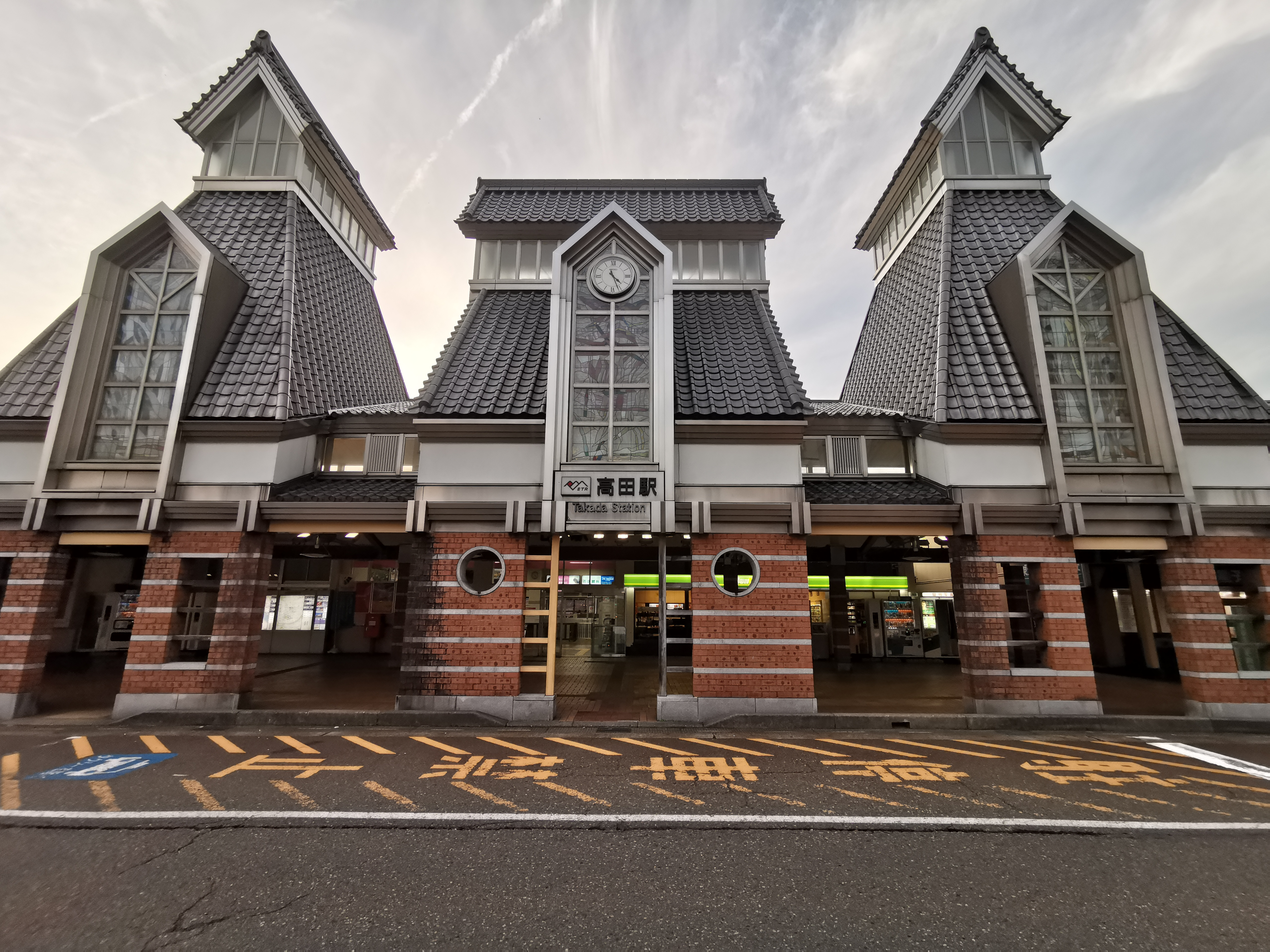 新潟県上越市にあるえちごトキめき鉄道(ETR)妙高はねうまラインの高田駅の駅舎を撮影。